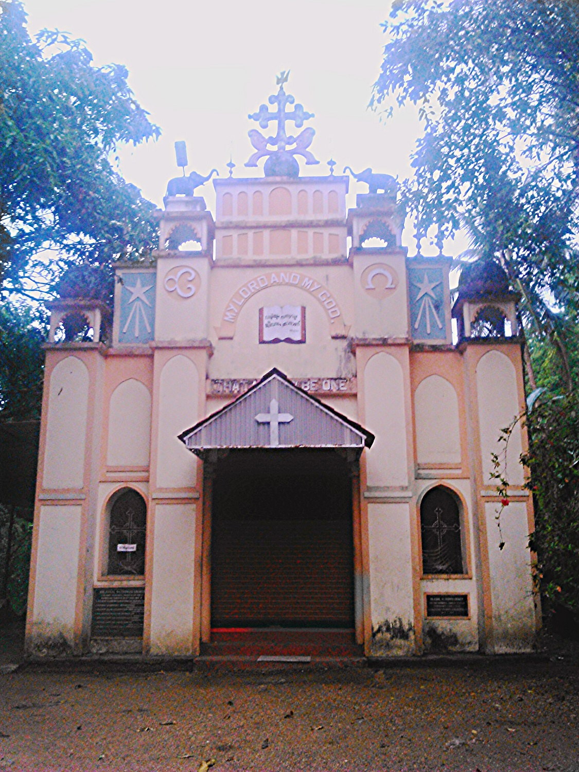 നിലയ്ക്കൽ സെന്റ് തോമസ് എക്യുമെനിക്കൽ പള്ളിയുടെ മുൻഭാഗ ദൃശ്യം